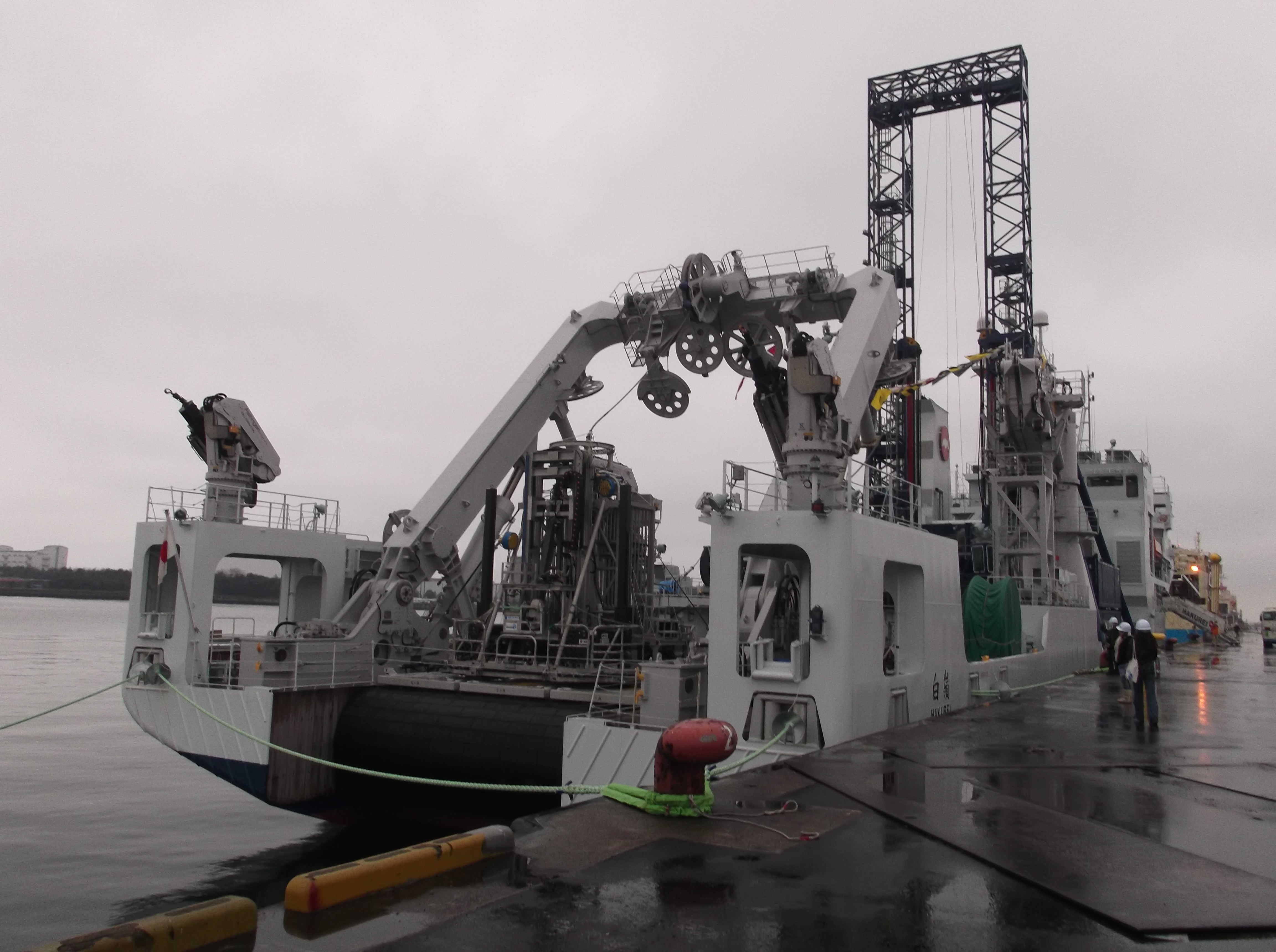 独立行政法人石油夕天然ガス・金属鉱物資源機構の調査船白嶺（はくれい）の後ろ姿、千葉県船橋市の船橋港で撮影